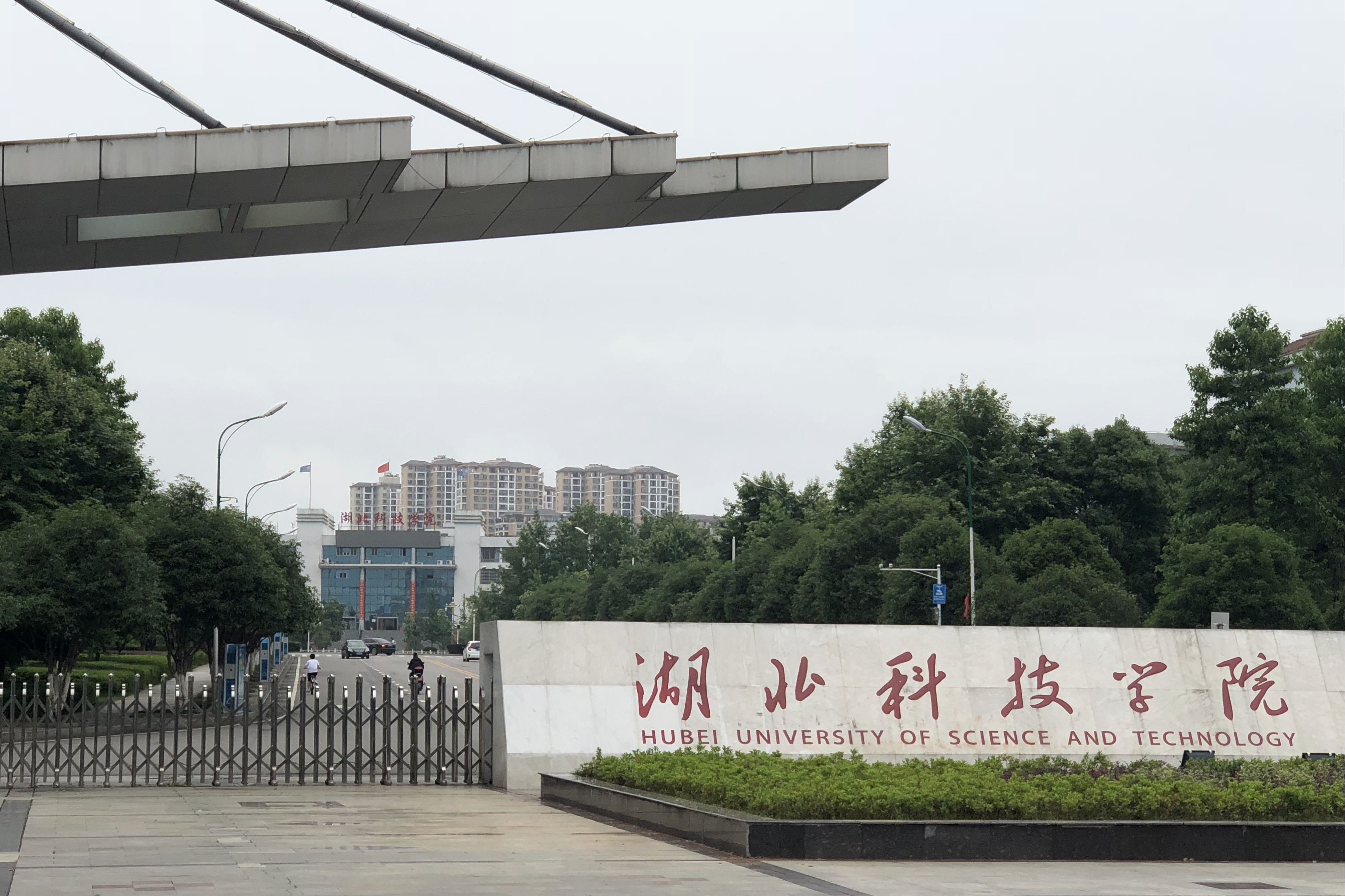 中文（中国大陆）: 湖北科技学院